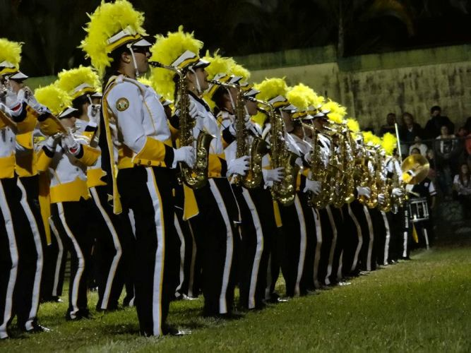 Banda Municipal de Acosta, Costa Rica.